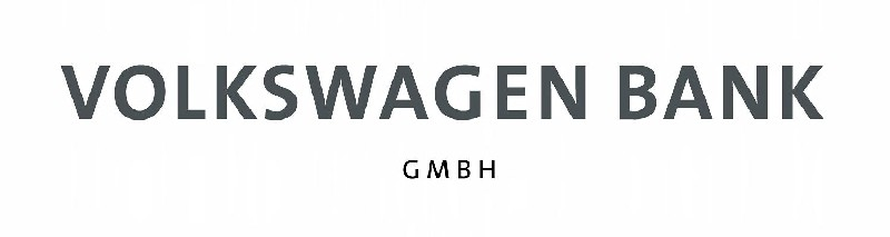 VW Bank Logo